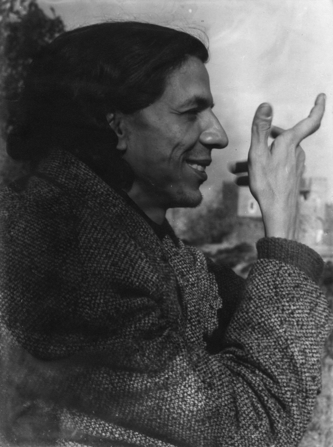 Ahmed Bouanani photographié par son frère Mohamed en 1970